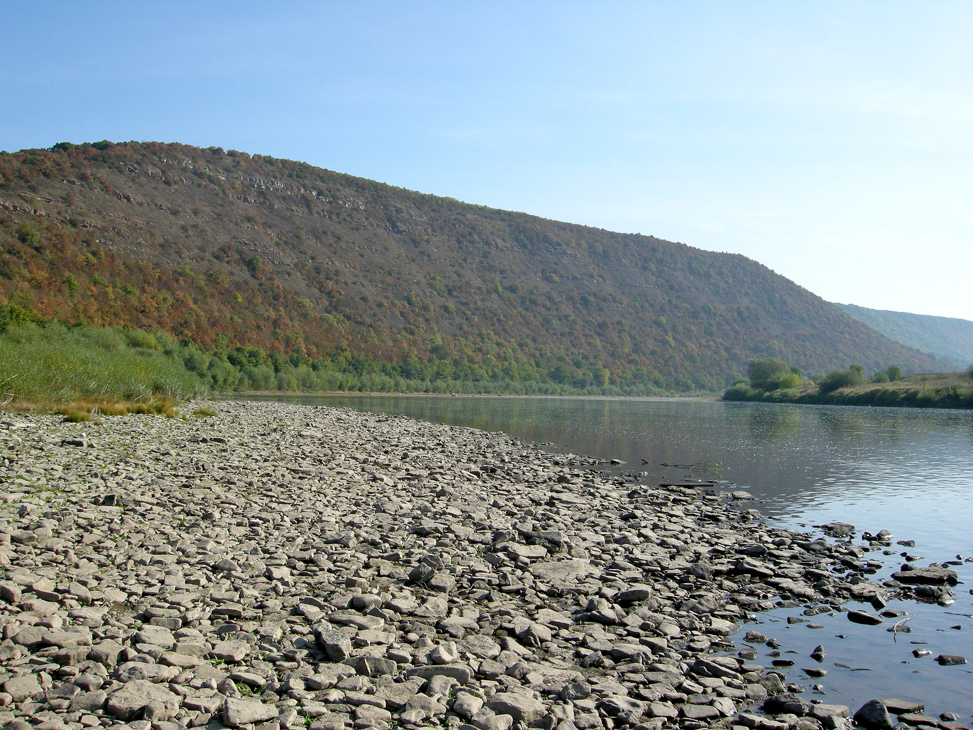 Національний природний парк «Дністровський каньйон» біля Червоної гори та русла Стрипи поблизу с. Берем'яни Бучацького району Тернопільської області. «Берем'янська наскельно-степова ділянка».